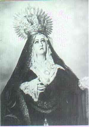 Foto antigua de Nuestra Señora de los Dolores, El Viso del Alcor (Sevilla)